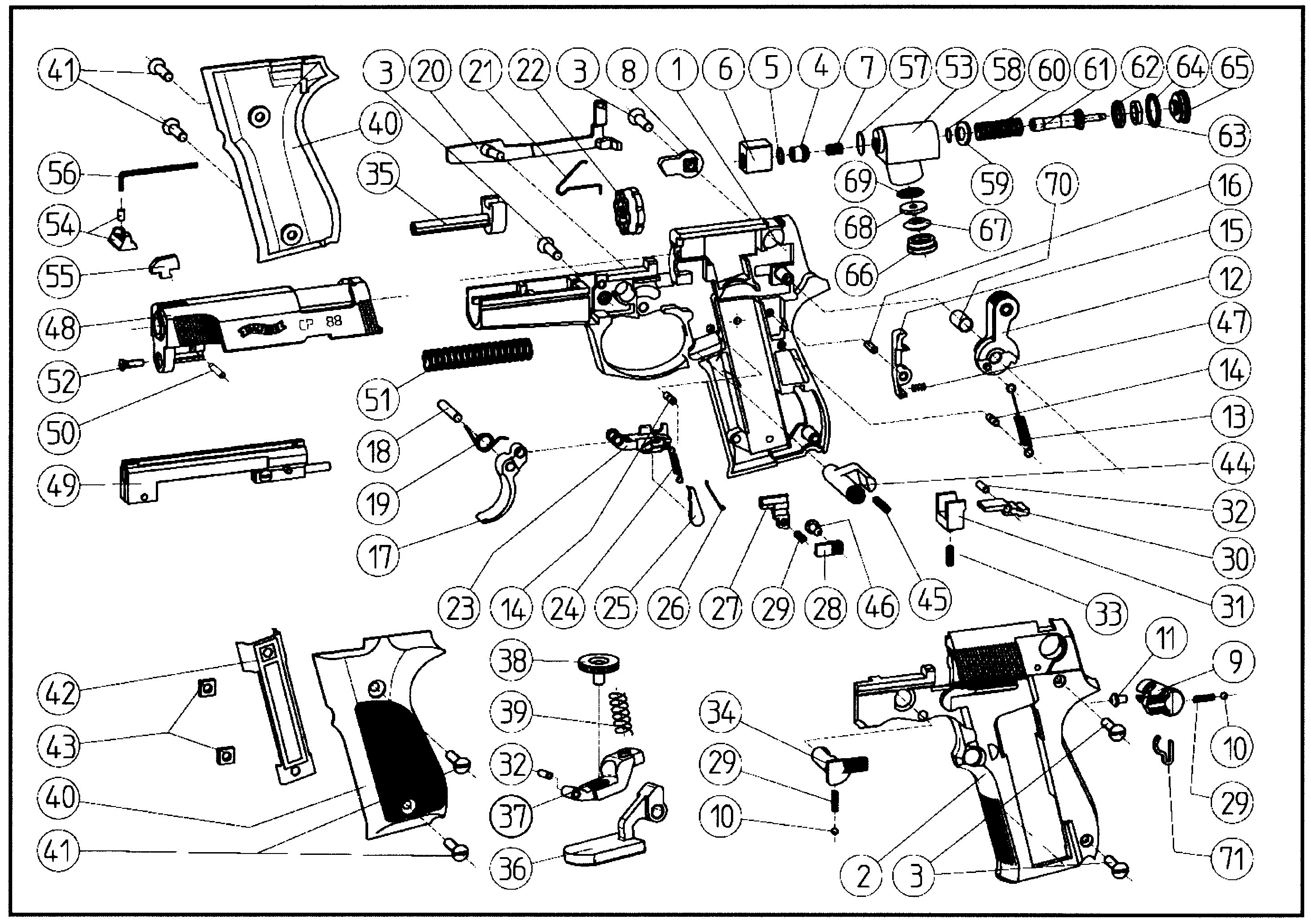 Einzelteile der "Walther CP 88" CO2-Pistole